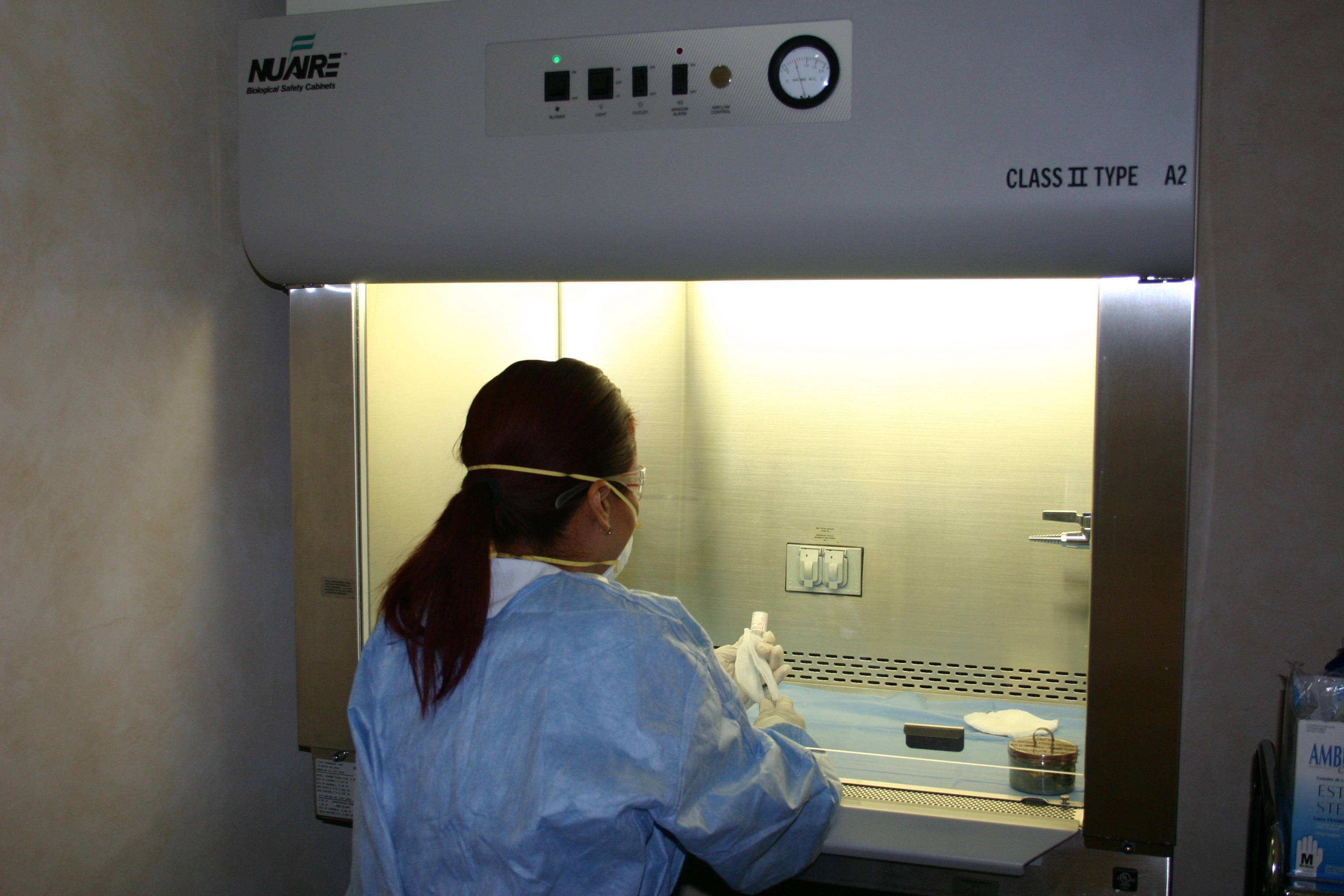 Haciendo mezclas de medicamentos en la campana de flujo laminar. Mixing the medications at the cabinet.